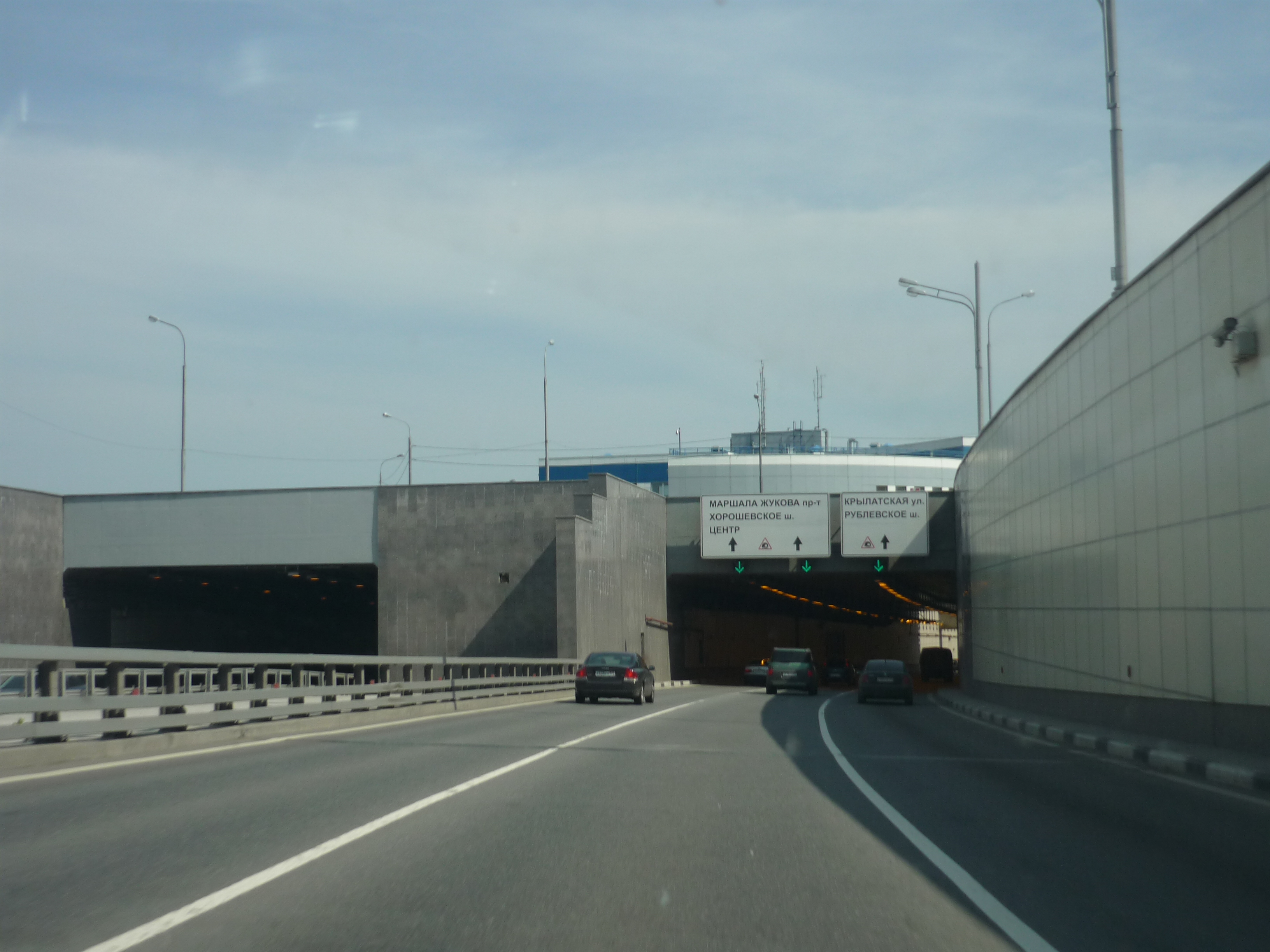 Северо-западный туннель, въезд со стороны области